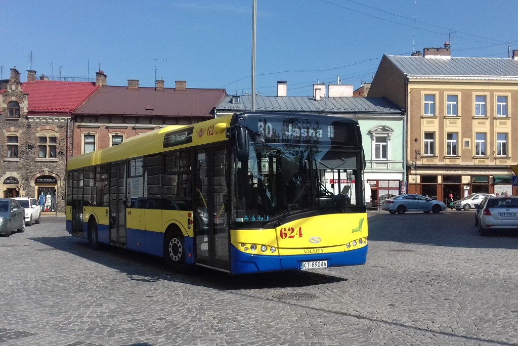 Solaris Urbino 12 III #624 MPK Tarnów